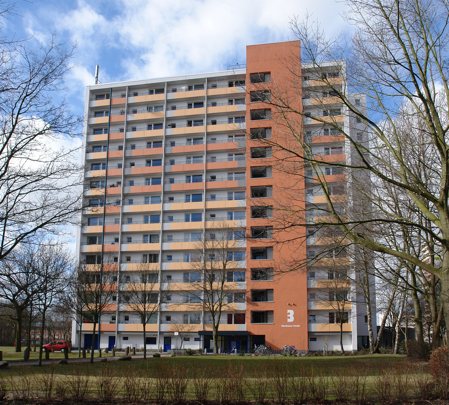 Bremen-Blockdiek: Hochhaus Oberhauser Str. 3 (14-geschossig).